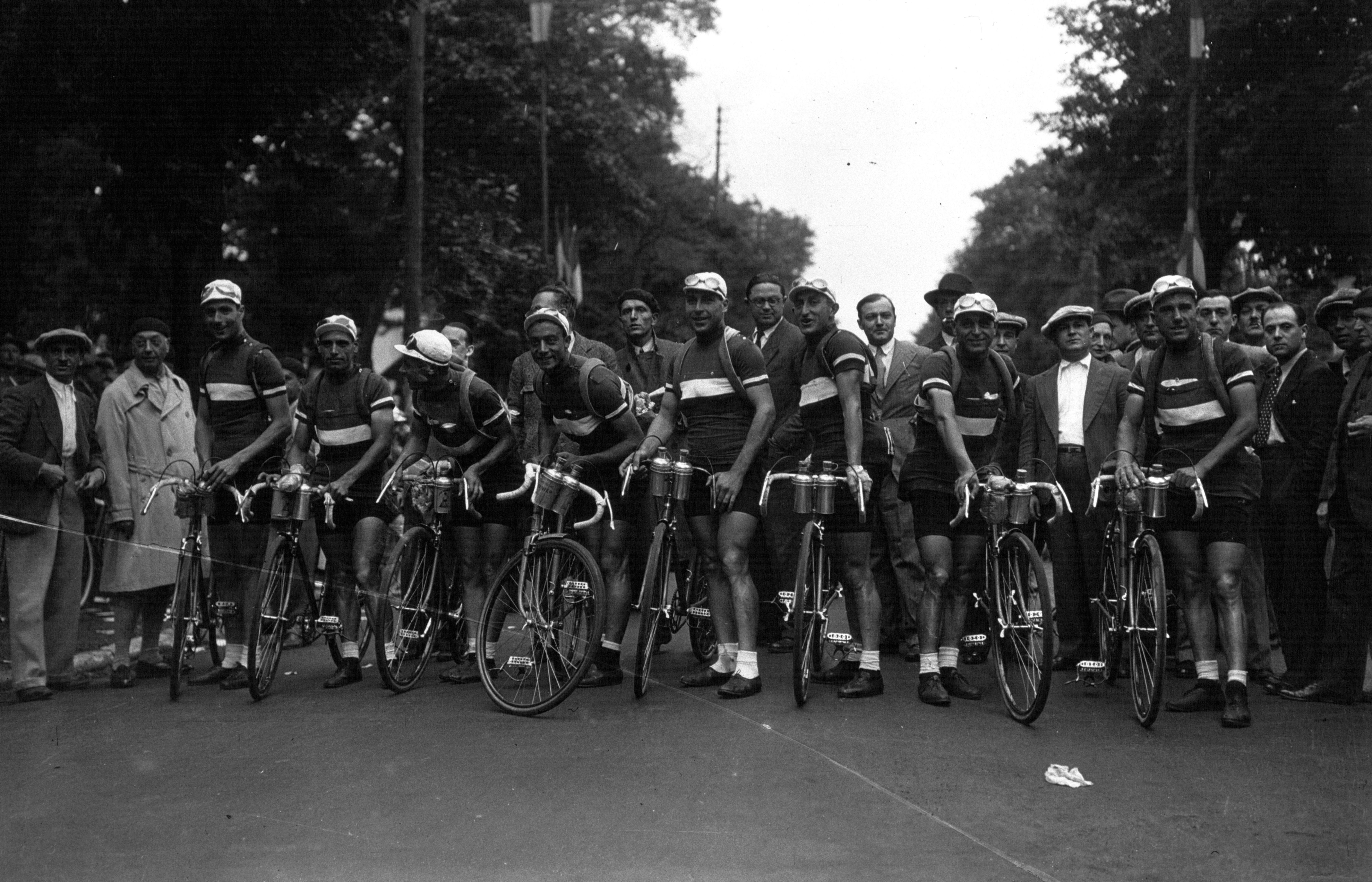 Équipe italienne lors du Tour de France 1932. De gauche à droite : Raffaele Di Paco, Antonio Pesenti, Aldo Canazza, Ambrosio Morelli, Eugenio Gestri, Francesco Camusso, Michele Orecchia, Luigi Marchisio